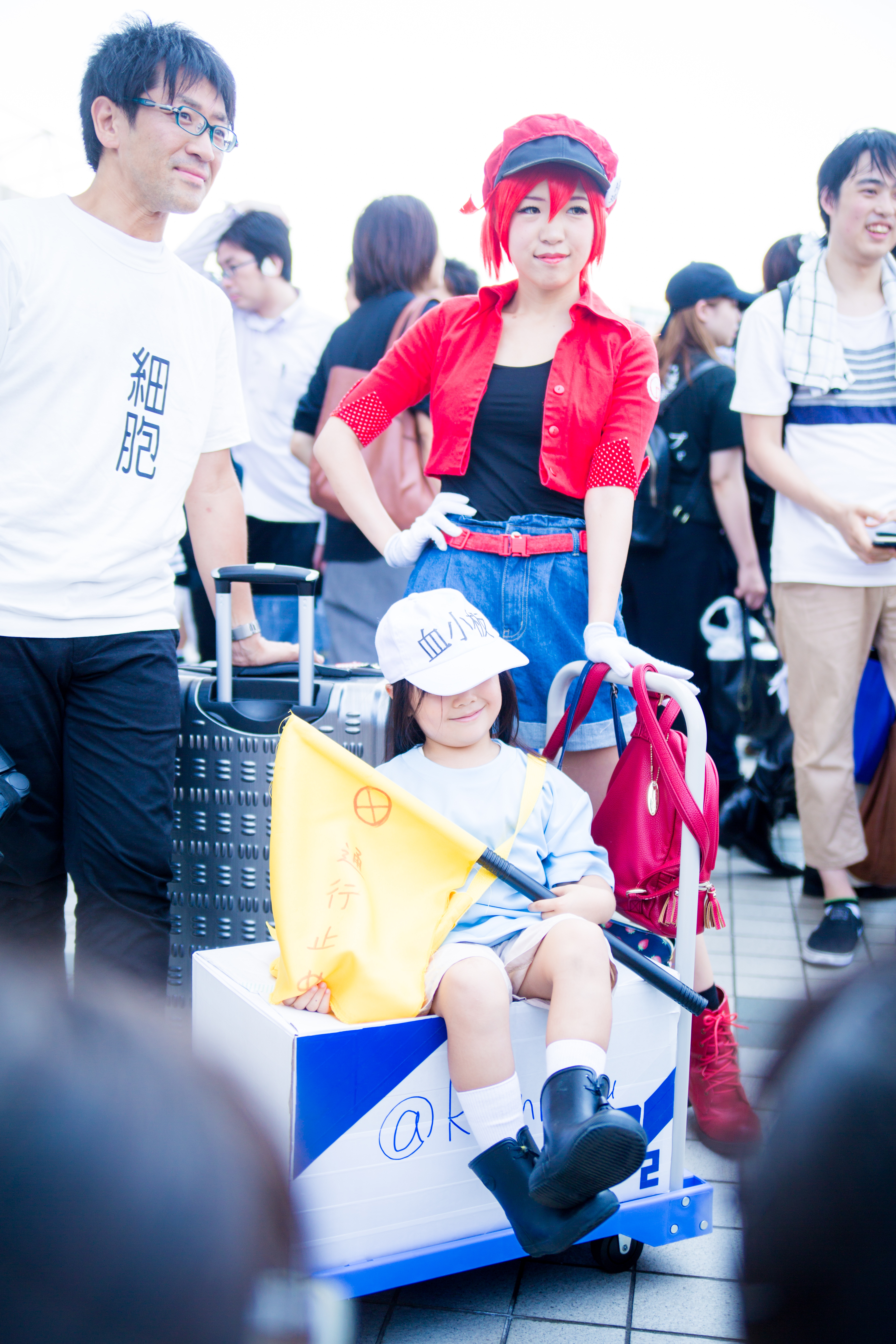 コミックマーケット94 1日目 コスプレイヤー